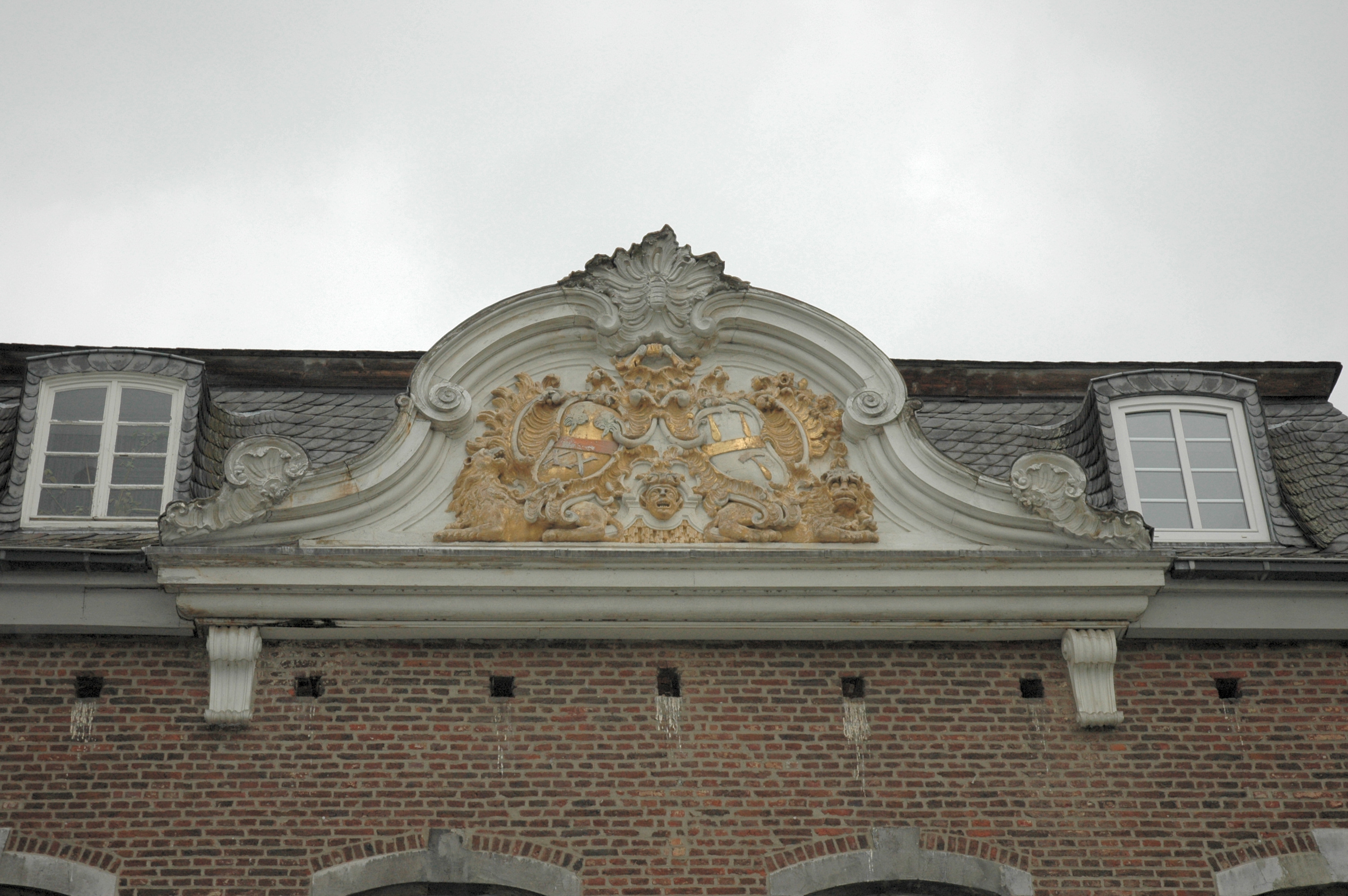 Schweifgiebel mit Allianzwappen am Herrenhaus des Guts Kalkofen in Aachen